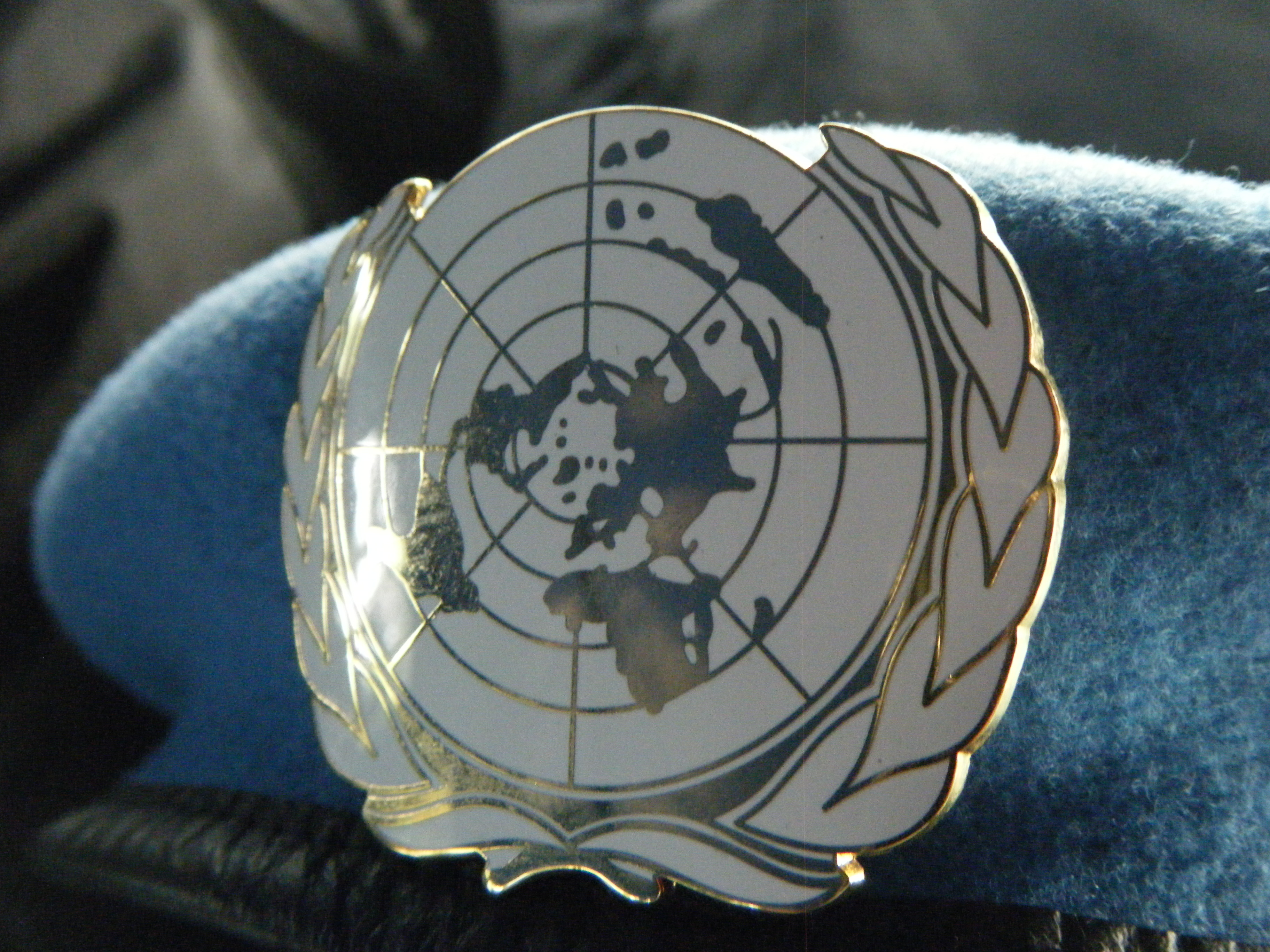 beret ONU de l'EGM 16/7